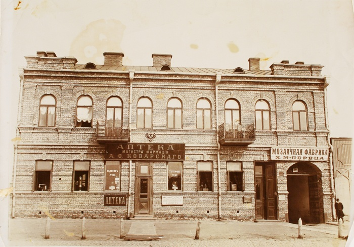 Дом Пераца ў Менску.